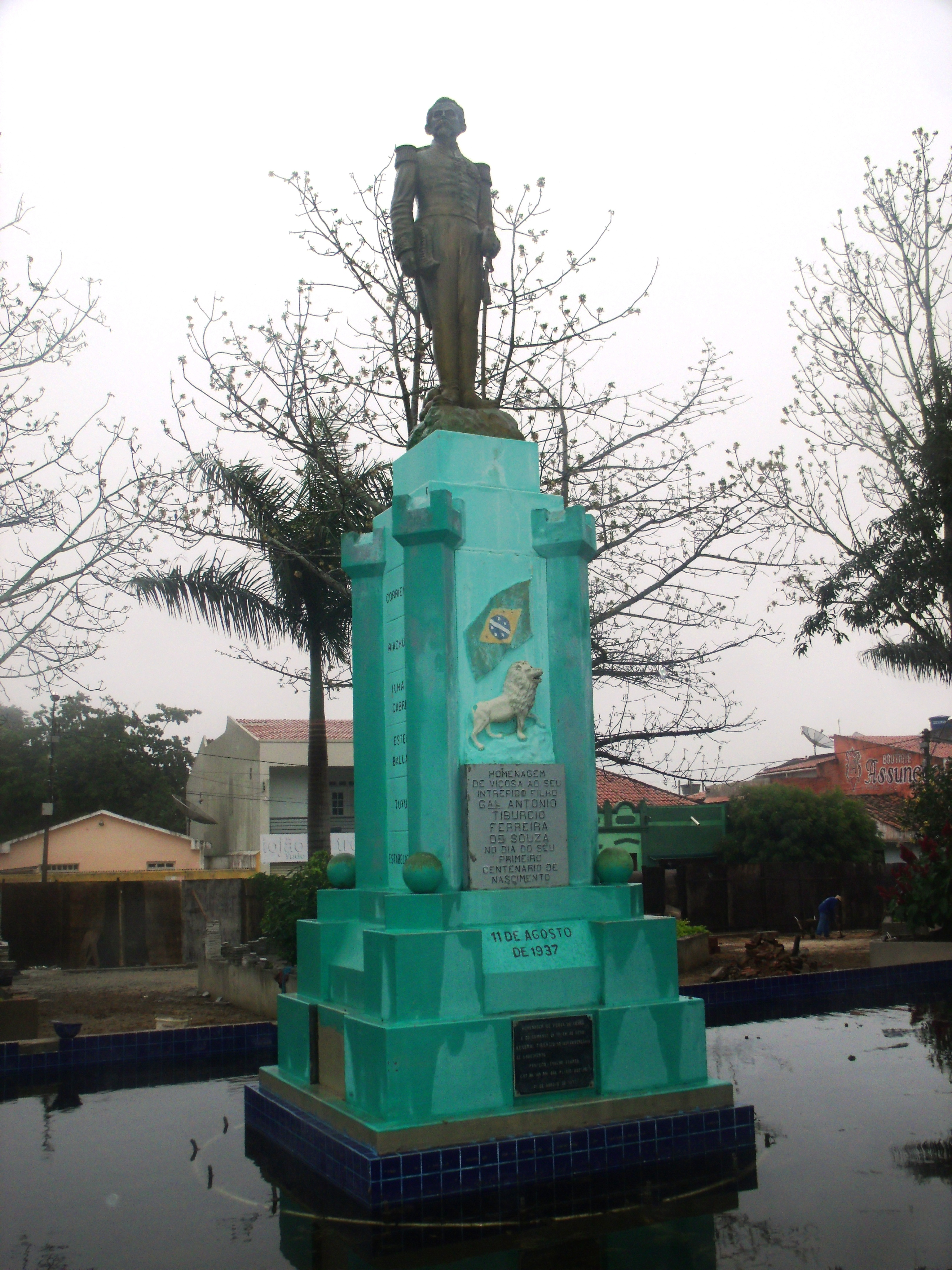 Estátua do General Tibúrcio, construída em 1937 na Praça Clóvis Beviláqua, uma praça pública em Viçosa do Ceará.